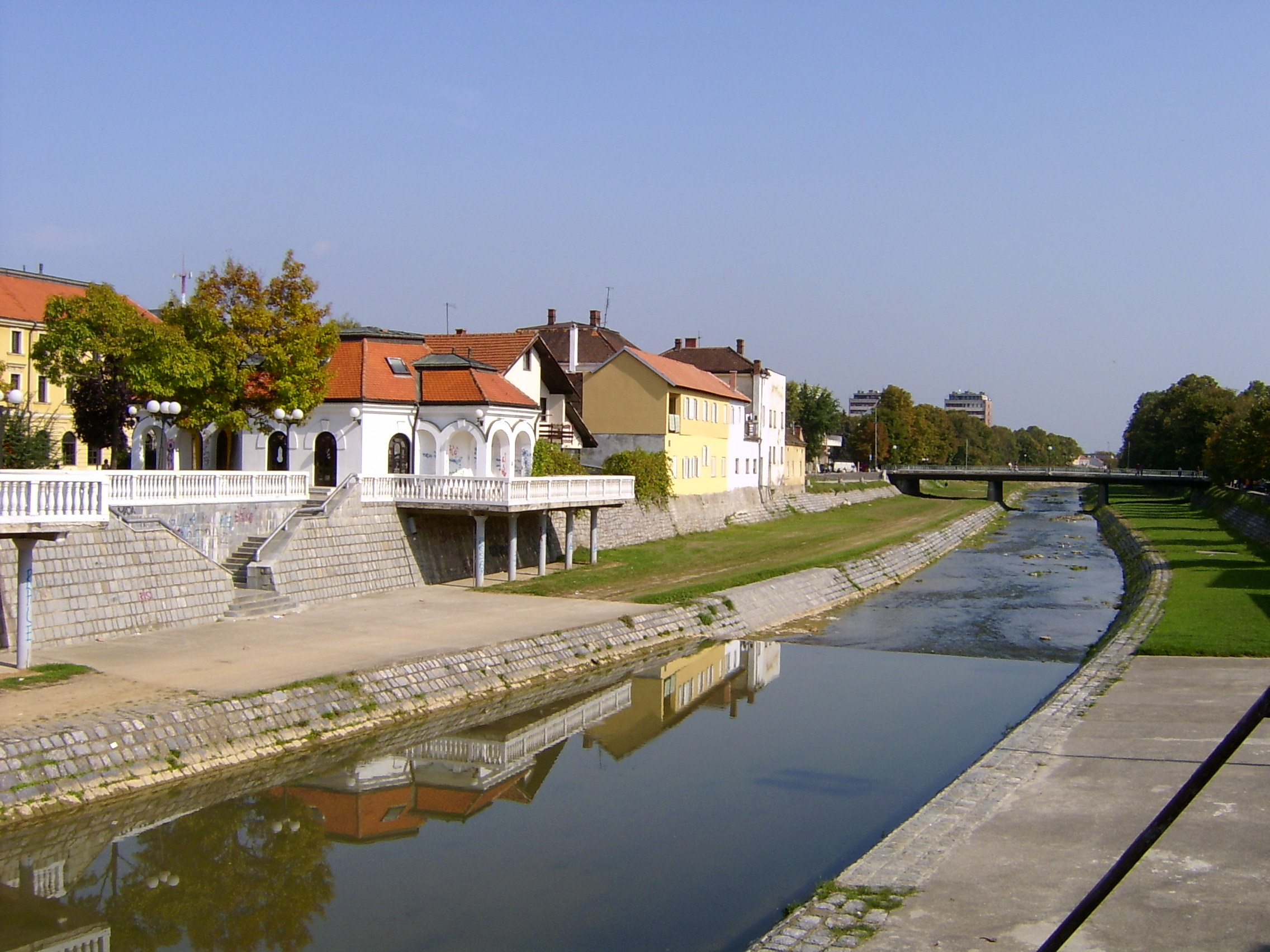 De Kolubara-rivier die door het stadje Valjevo in Servie loopt.